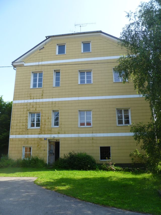 Schloss_Bruck-heute